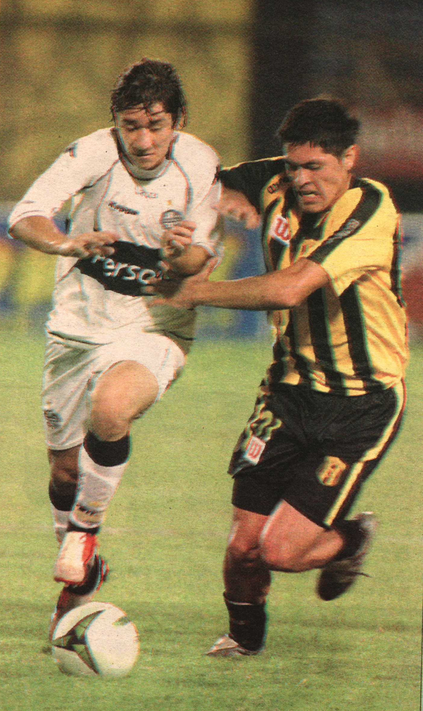 Paulo Centurion del Club Guarani disputando el balon con Jose Montiel del Club Olimpia, encuentro disputado en el Estadio Feliciano Cáceres de Luque.